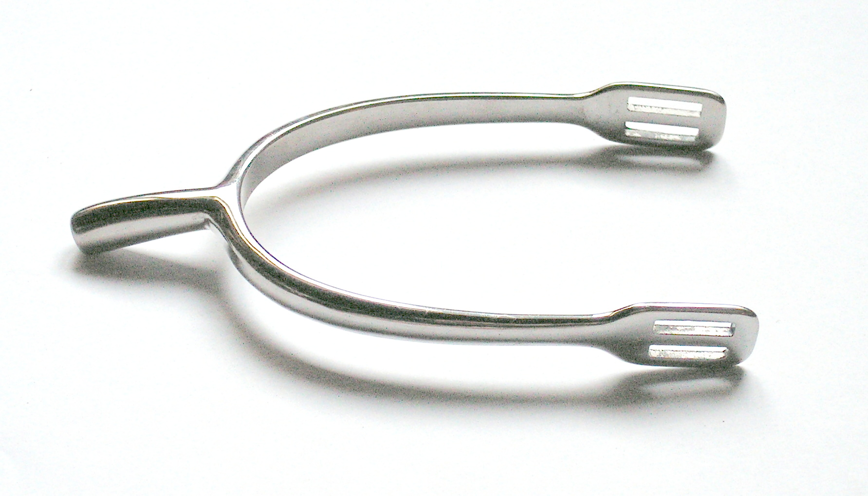 Eperon prince de Galle, tige longue